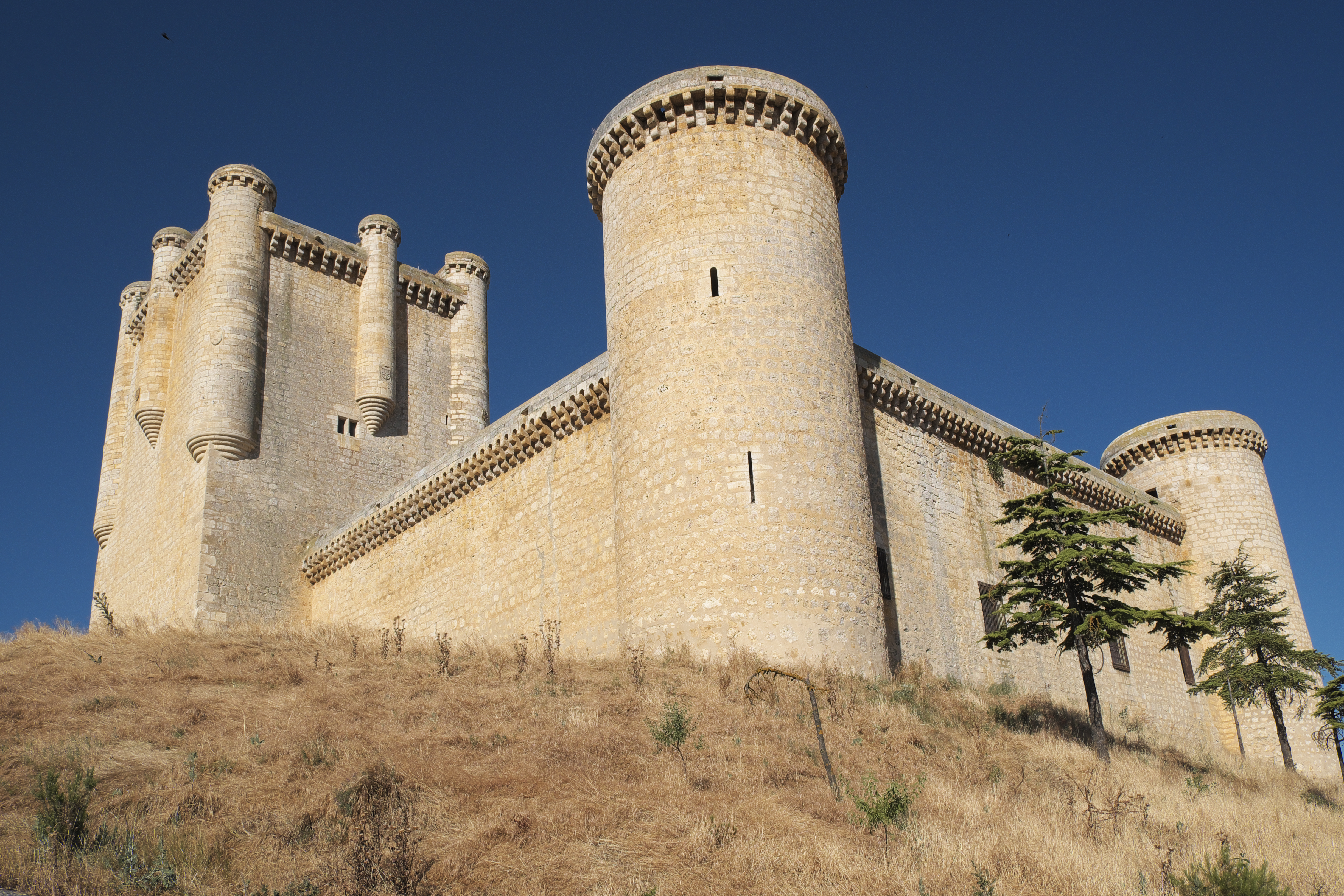 Castillo de los Enríquez, Burg von Torrelobatón in Torrelobatón in der Provinz Valladolid (Kastilien-León/Spanien)